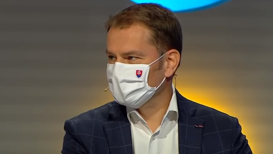 Premiér Igor Matovič v pořadu Inkognito na televizi Joj.